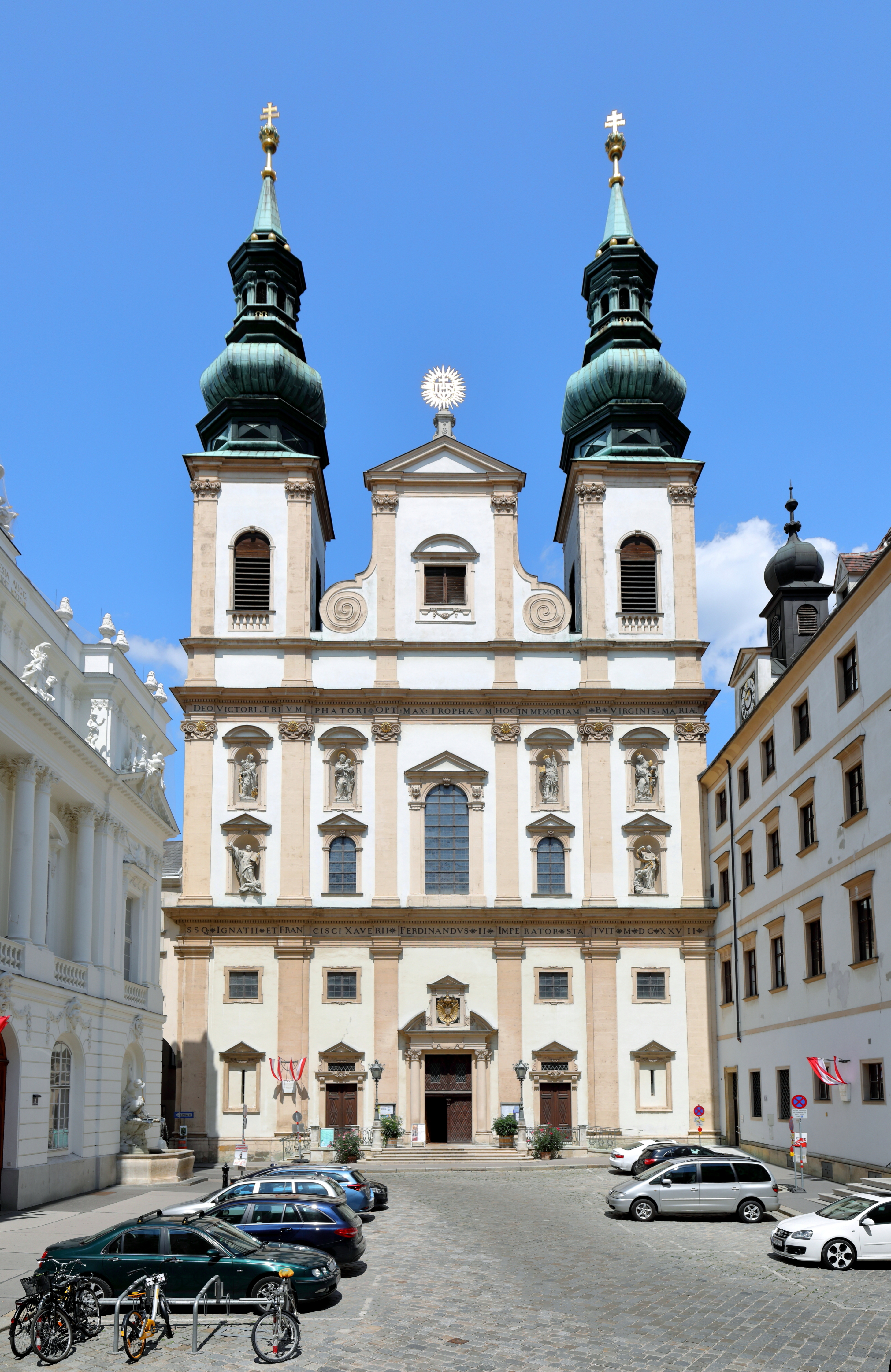 Die Universitätskirche bzw. neue Jesuitenkirche am Dr.-Ignaz-Seipel-Platz neben der alten Universität im 1. Wiener Gemeindebezirk Innere Stadt.Die Kirche wurde an der Stelle einer Kapelle um 1625 errichtet und erhielt ihre heutige Gestalt Anfang des 18. Jahrhunderts, indem unter anderem die Türme errichtete und neu fassadiert wurde. Nach der Aufhebung des Jesuitenordens 1773 ging die Kirche in den Besitz des Staates über. Nach der Wiederzulassung (1814) sind seit 1856 wieder Jesuiten in der Kirche tätig.